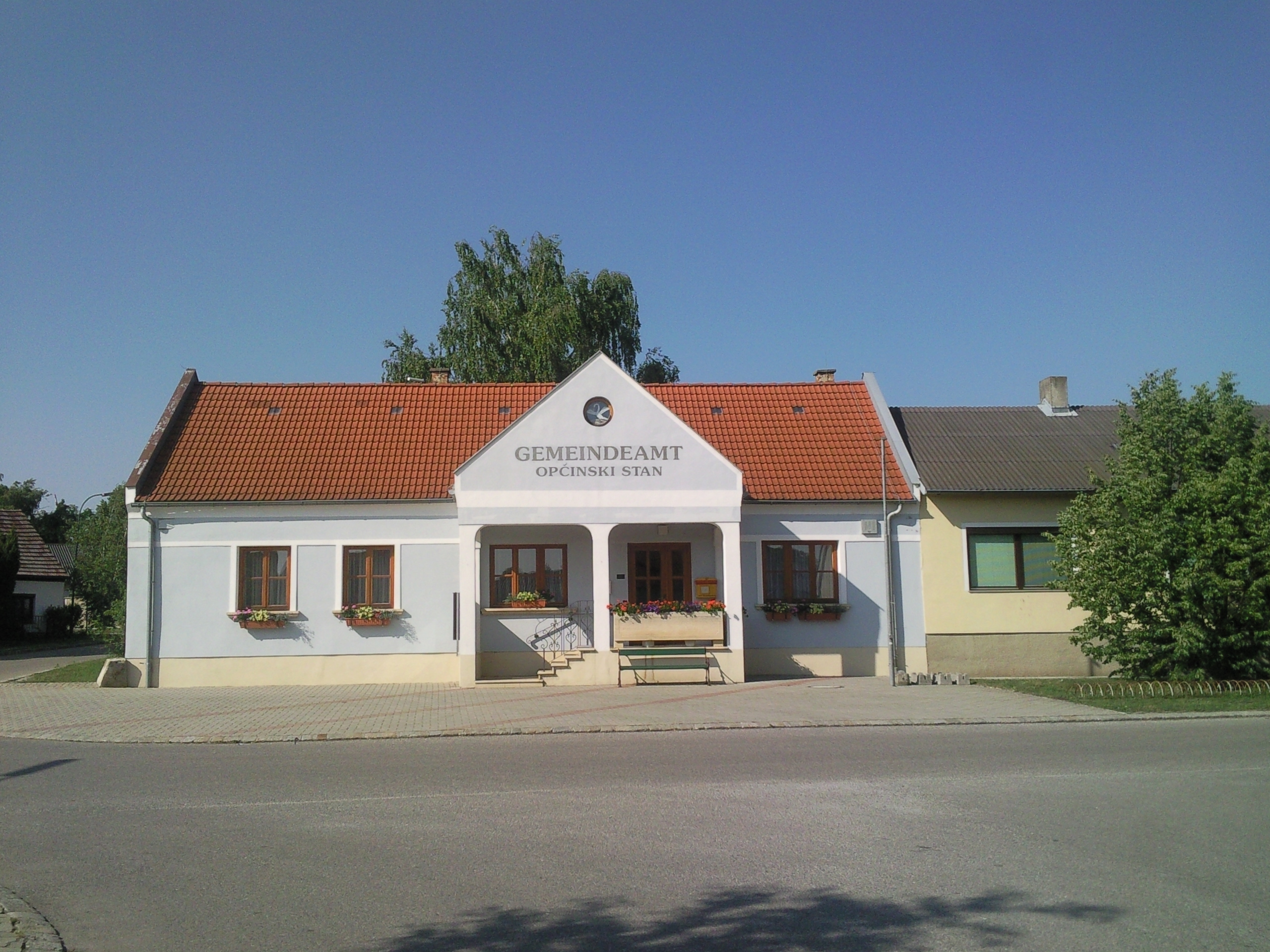 Neudorf